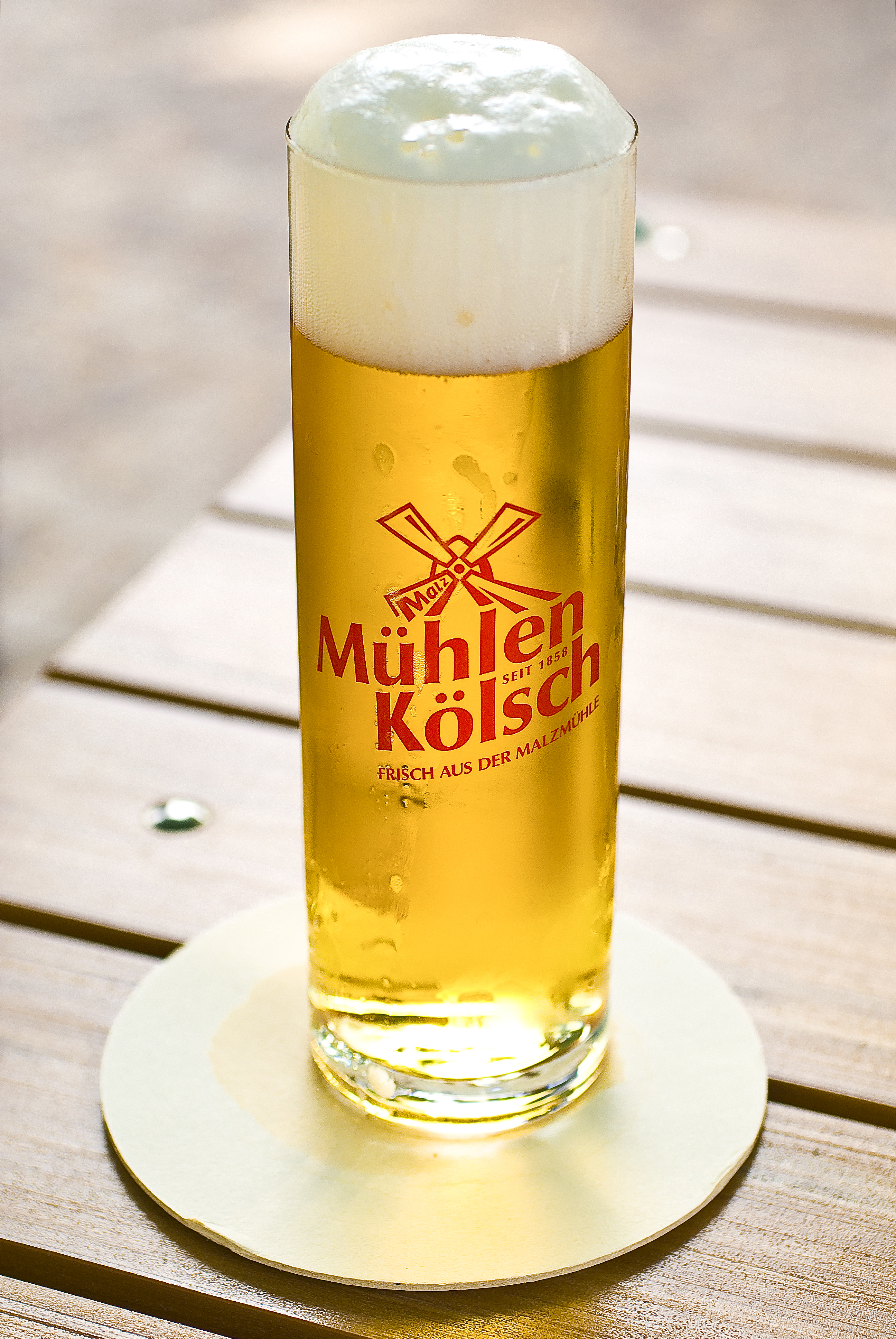 Ein frisch gezapftes Glas Mühlenkölsch